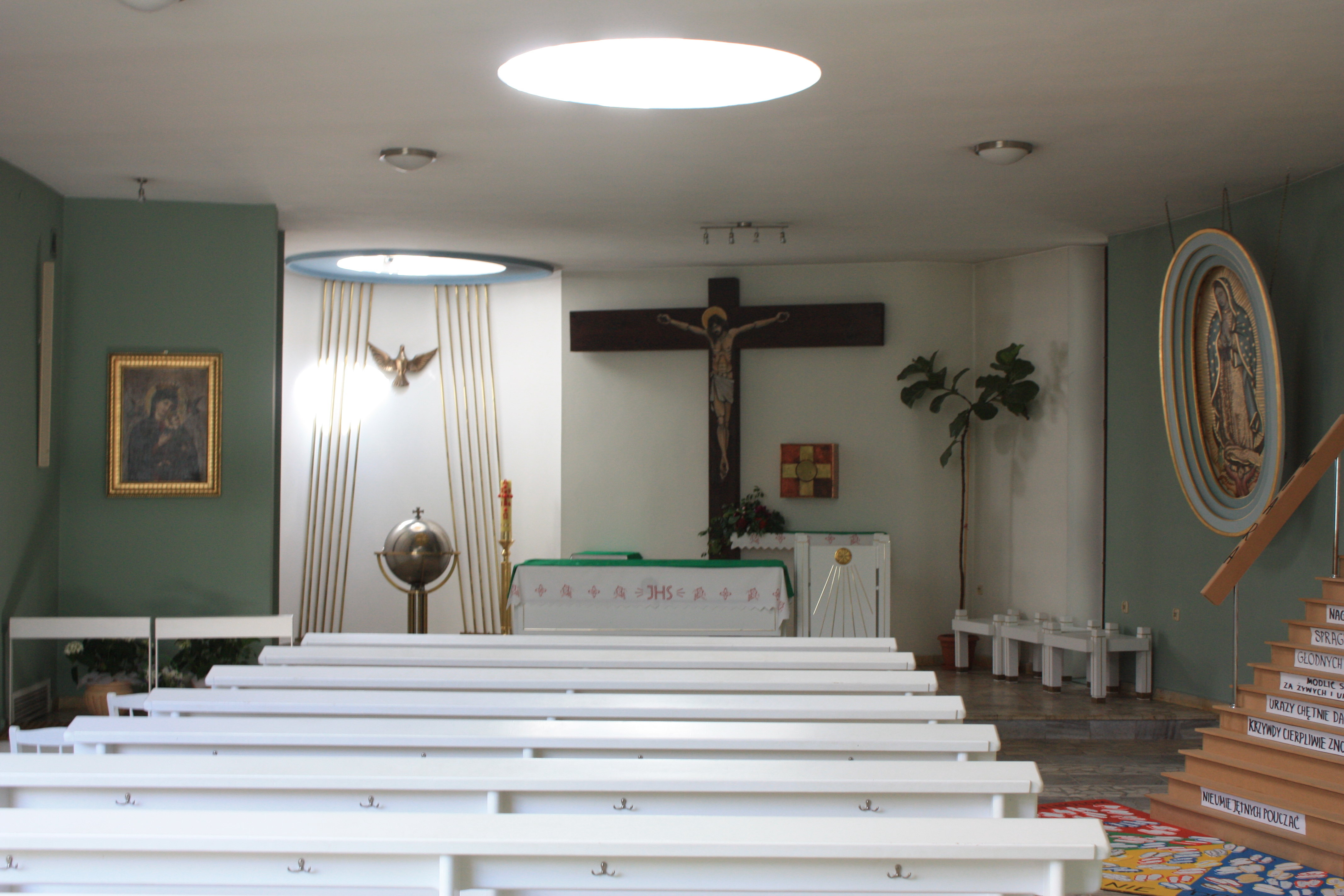 Kaplica chrzcielna kościoła Świętej Rodziny w Poznaniu.